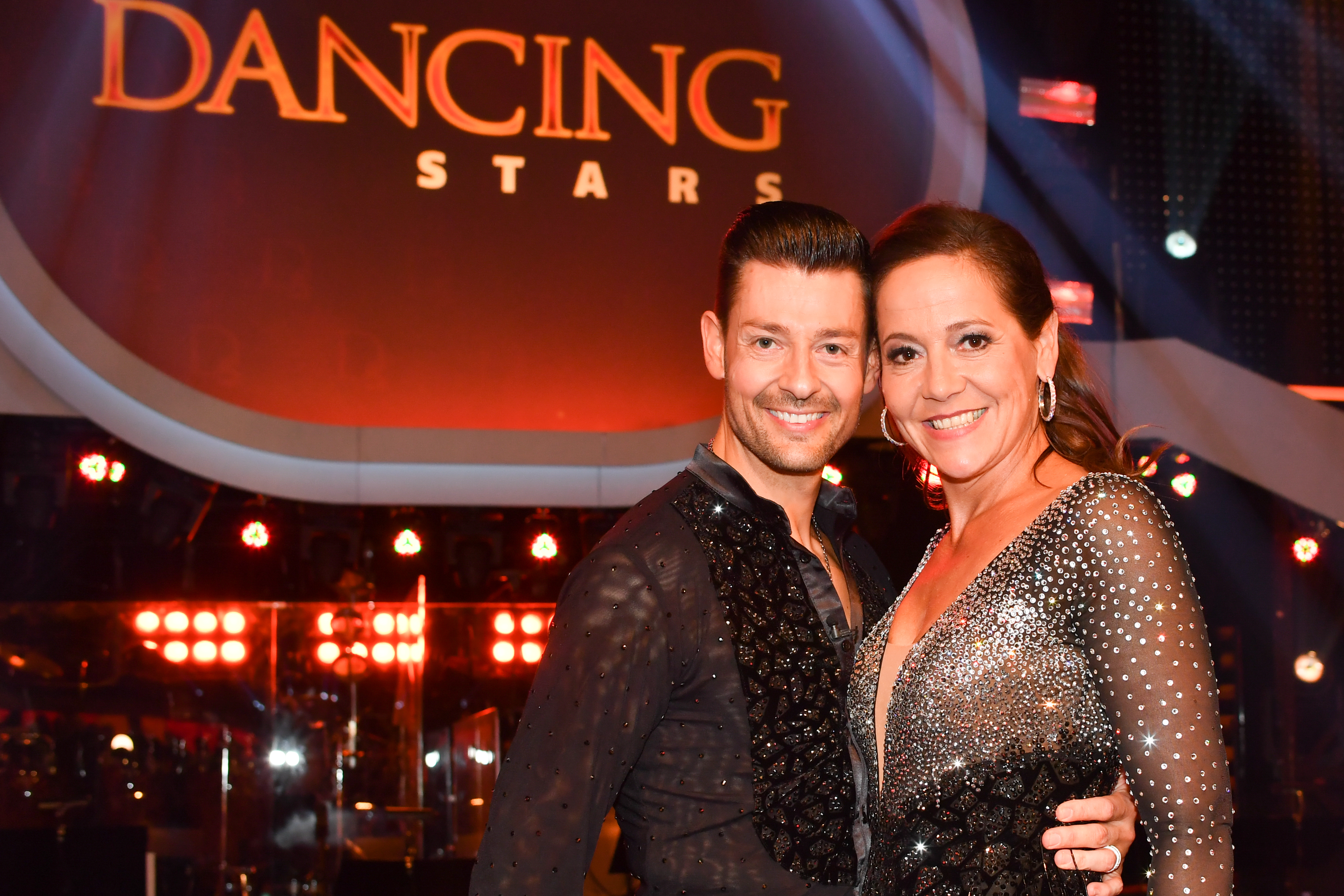 ORF Dancing Stars am 7. April 2017 in Wien. Bild zeigt Florian Gschaider und Monica Weinzettl.